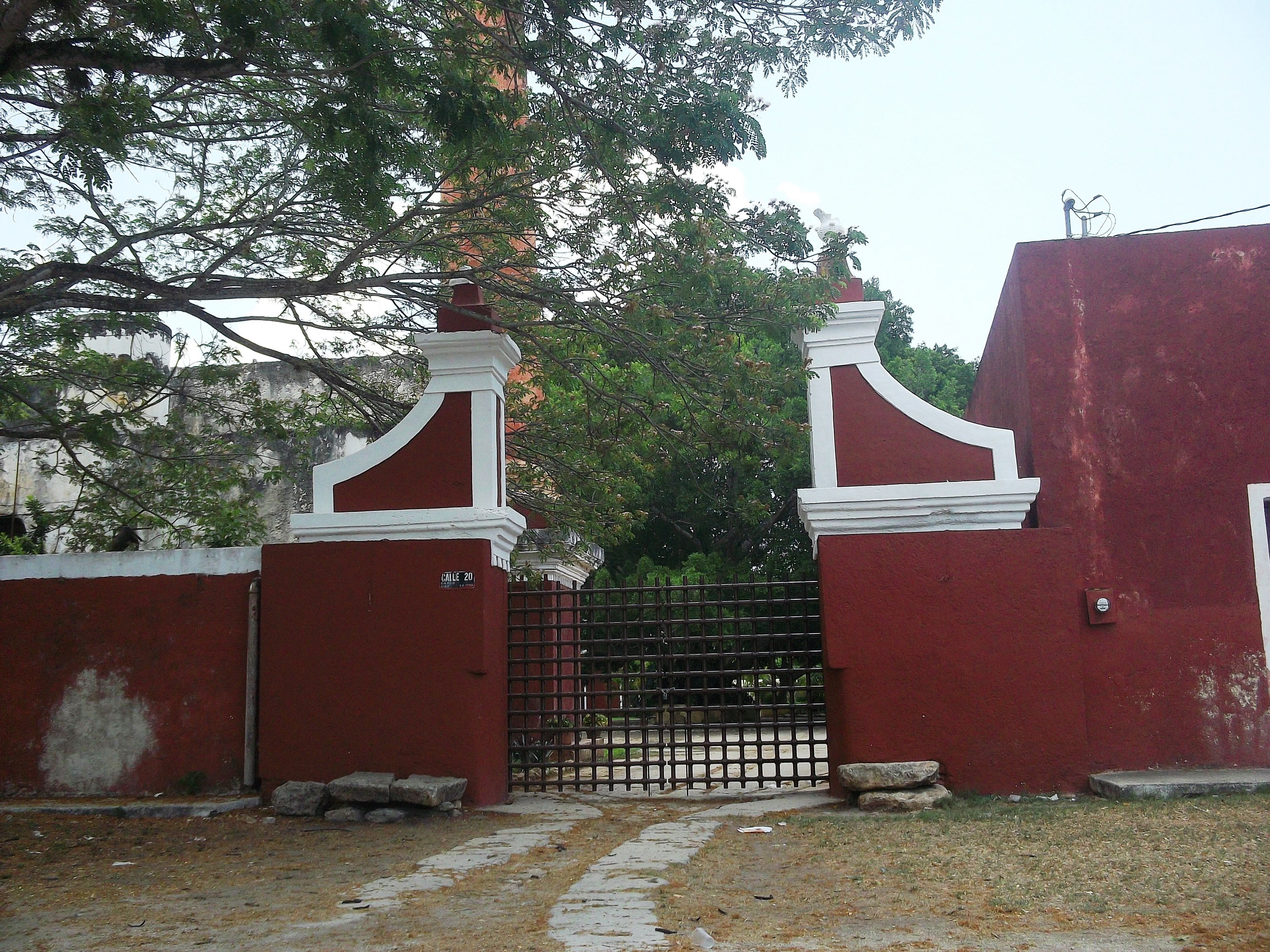 Hacienda de San Pedro Chimay, Yucatán.